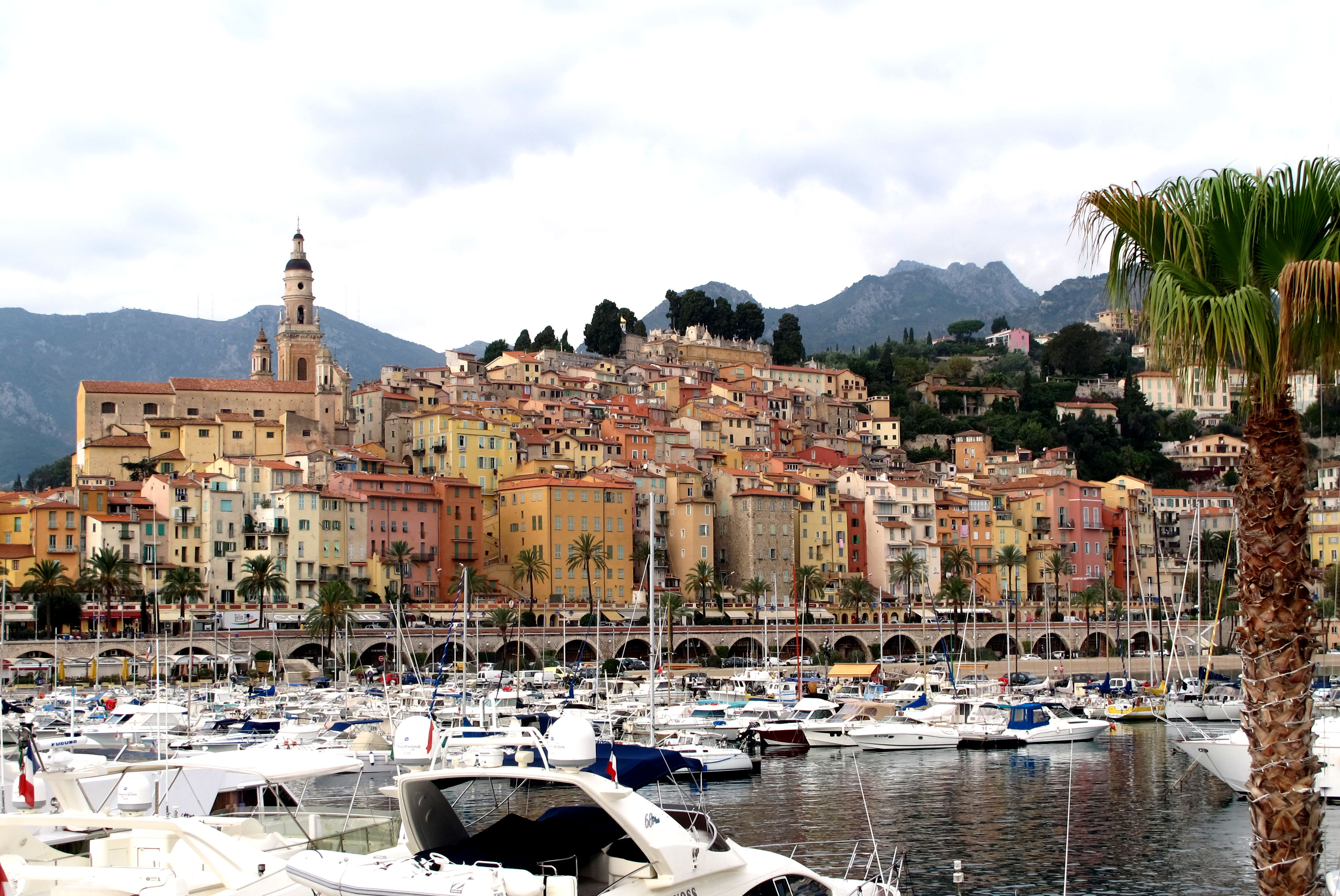 Vieille ville de Menton vue du port. PACA, France